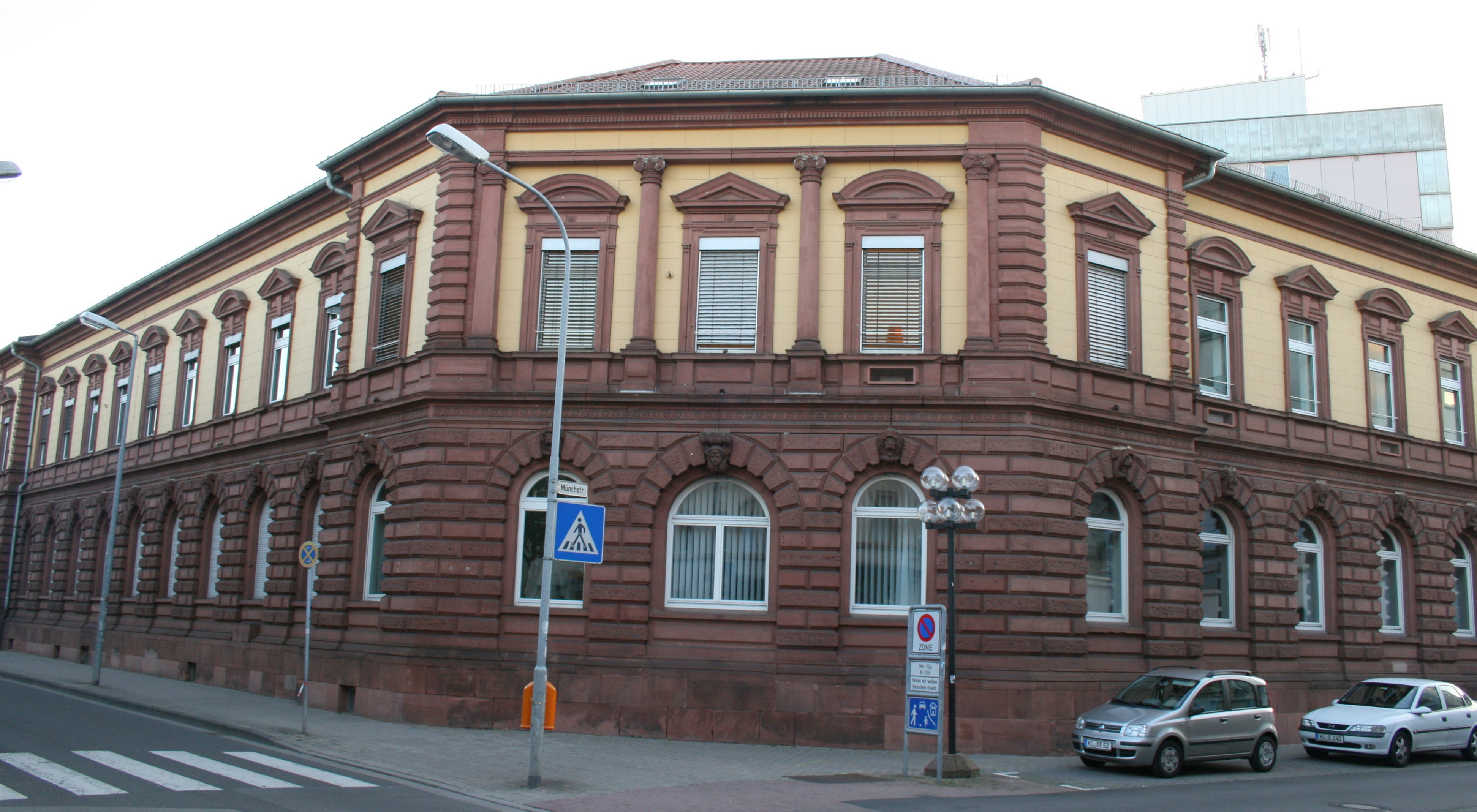 Rummelstraße 9: ehemalige Post; anspruchsvoller spätgründerzeitlicher Eckbau, zweiflügeliger Sandsteinquaderbau, 1890, Architekt Ludwig Ritter von Stempel